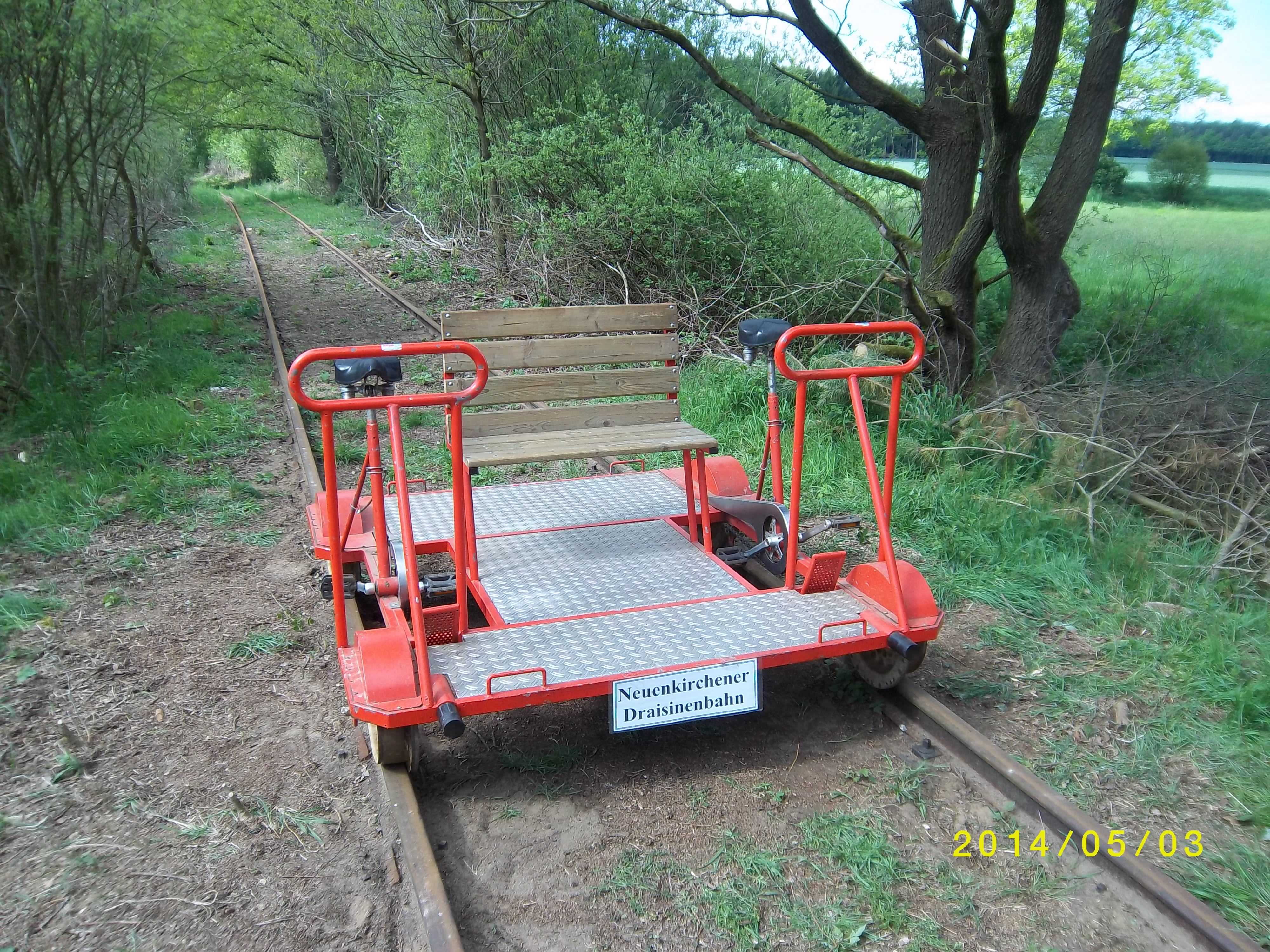 Das Schienenfahrrad ist vom Hersteller: Play-Team. Es wurde auf der Neuenkirchener Draisinenbahn eingesetzt. Verbleib: Böhmetalbahn.